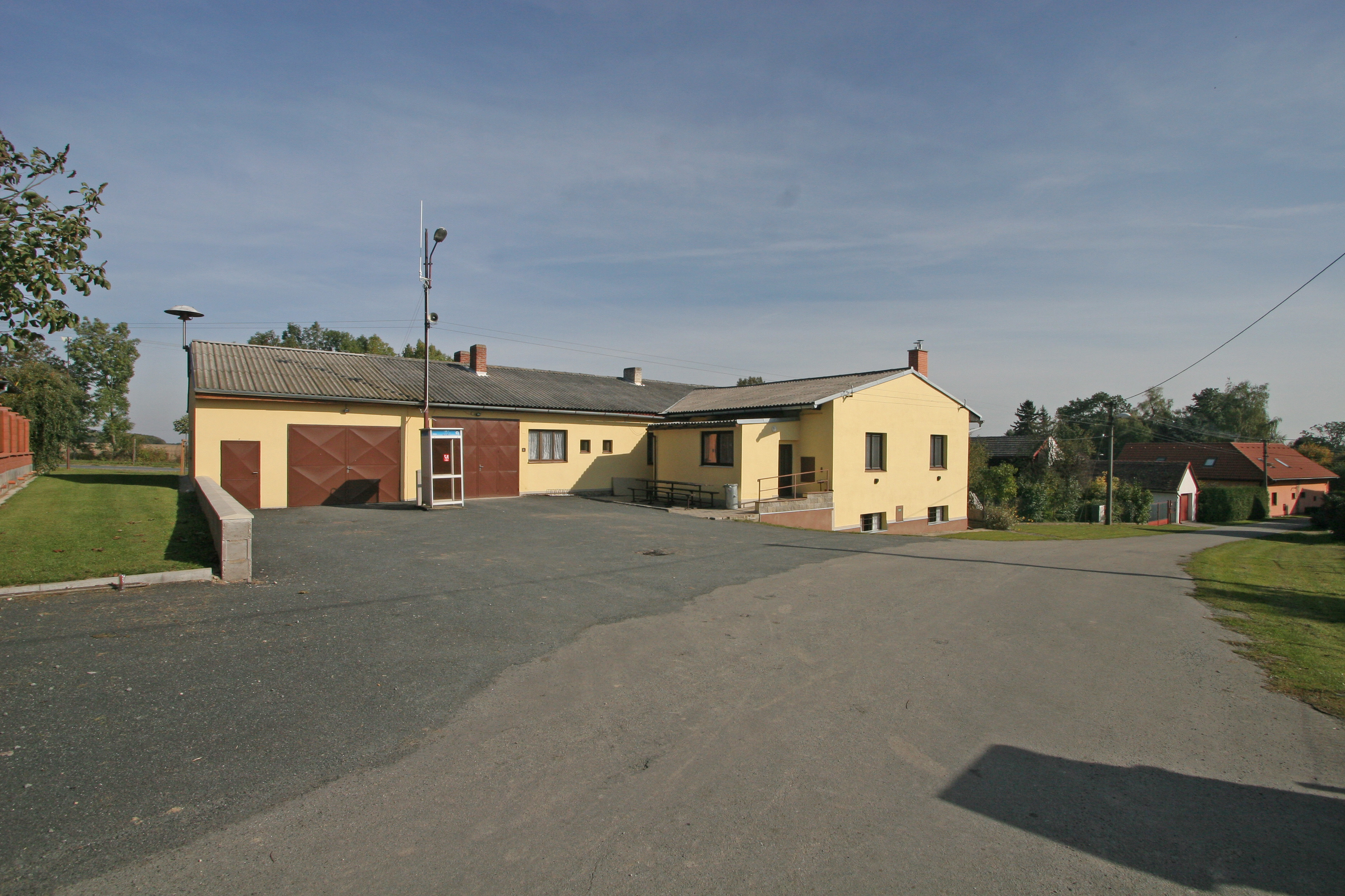 Jedousov hasičská zbrojnice a obecní úřad